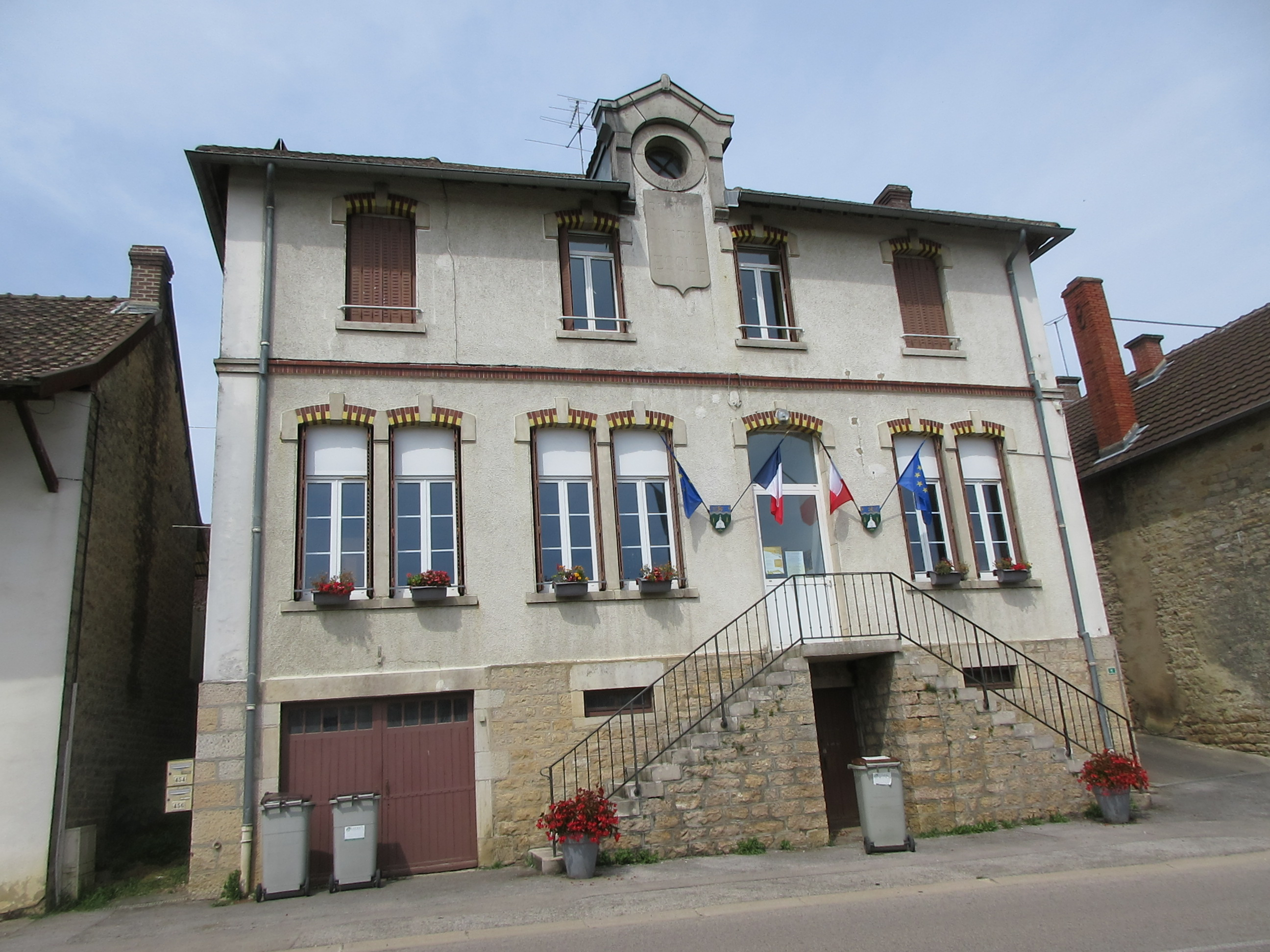 Mairie de Condamine, Jura.